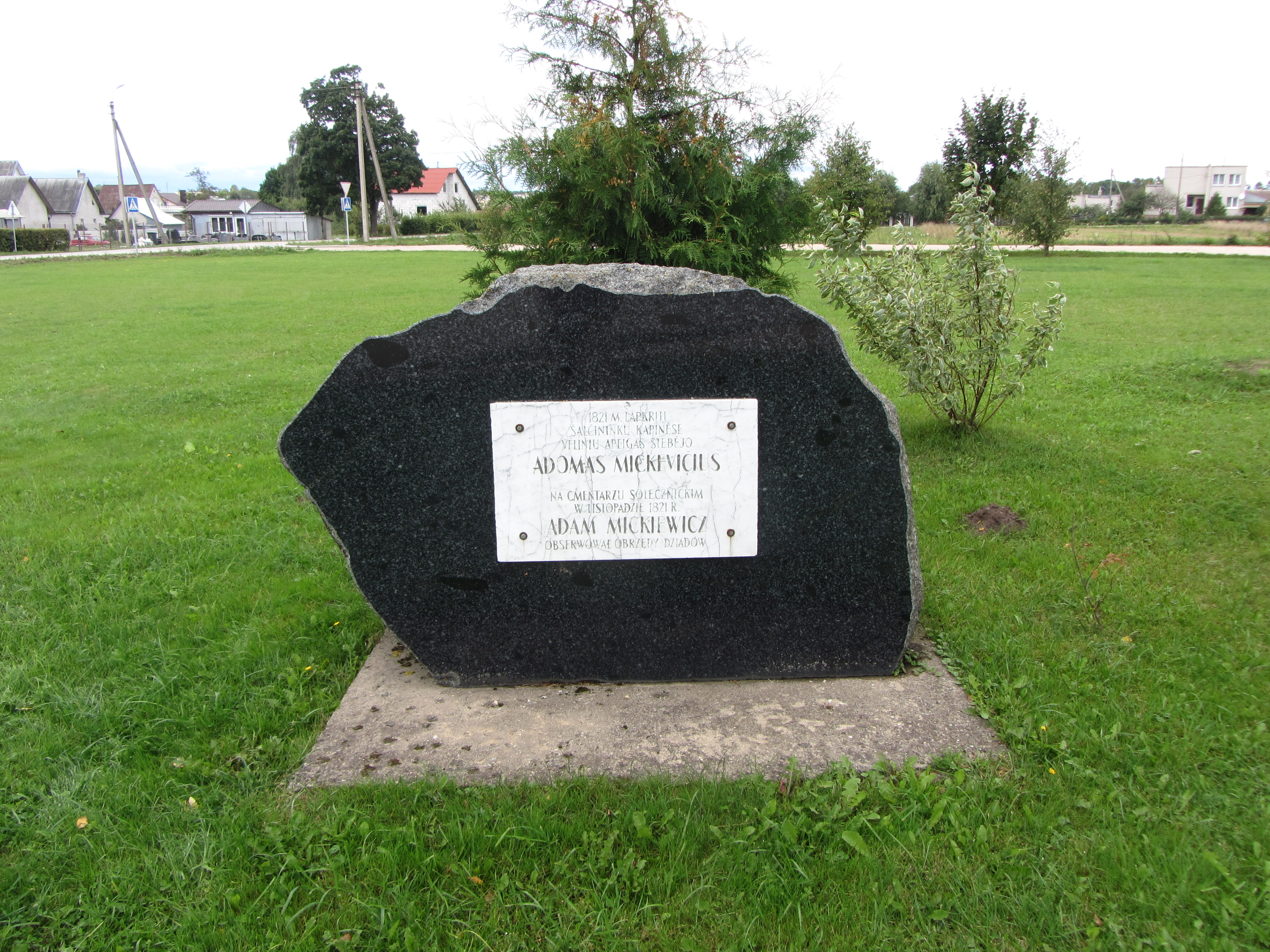 Šalčininkai, Lithuania